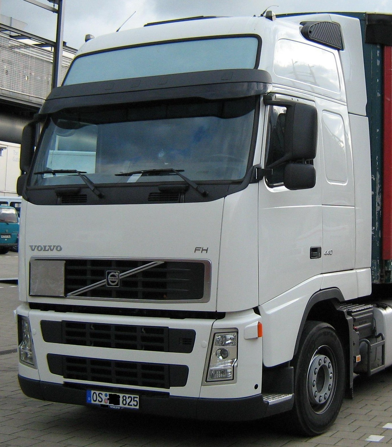 Volvo LKW Fahrerhaus Typ ab 2001